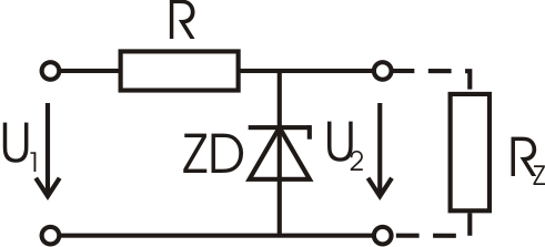 Schéma parametrického stabilizátoru napětí